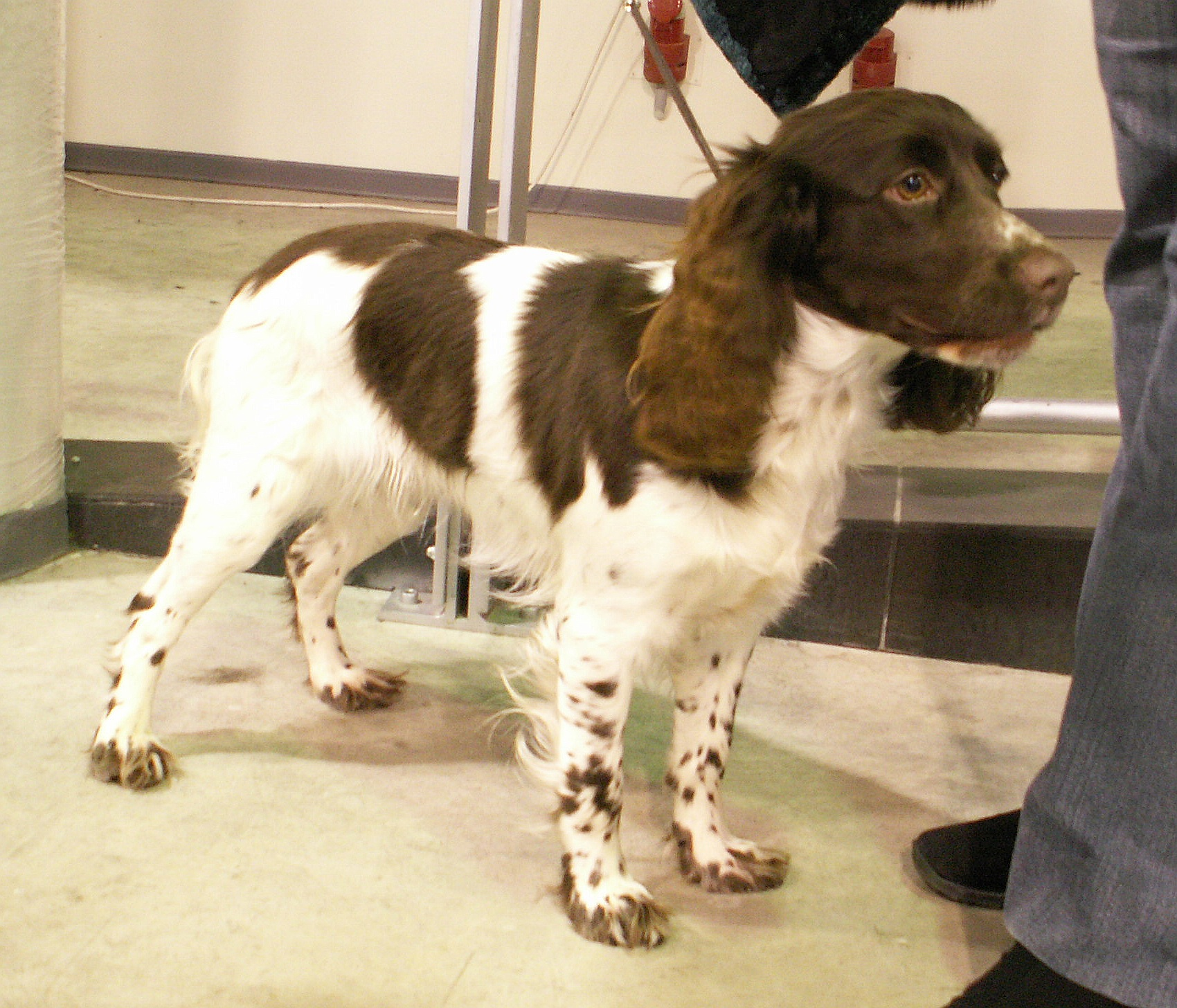 Rosyjski spaniel myśliwski